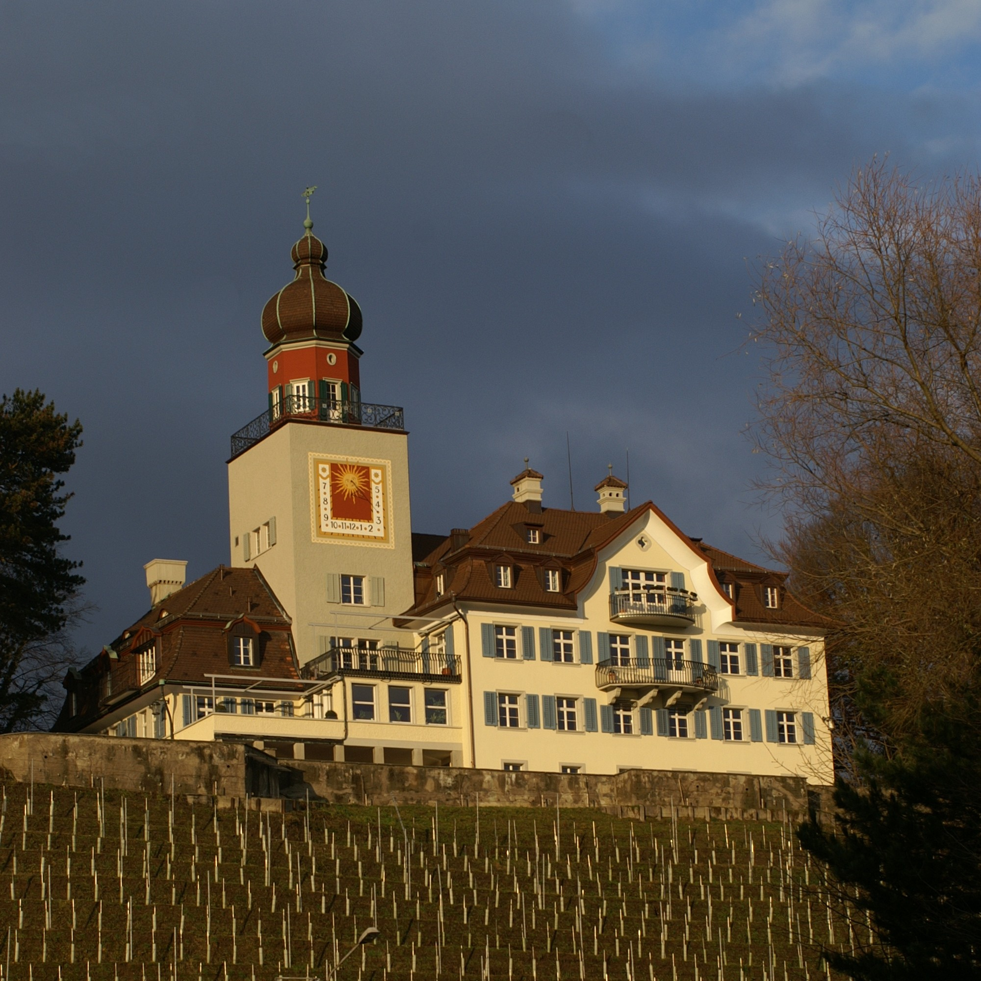 Das Schloss Heerbrugg in CH-9436 Balgach, gilt zweifellos als Ursprung von Heerbrugg. Anscheinend bestand bereits zu Römerzeiten ein Kastell, auf deren Grundmauern im Jahre 1077 die Feste "Herburch" erbaut wurde, welche aber später abbrannte. Das bestehende Schloss ohne Turm stammt etwa aus dem Jahre 1775. Bis 1796 bestand Heerbrugg lediglich aus dem Schloss mit drei Häusern. Die Ebene war gänzlich unbewohnt. Quelle: [1] Die Geschichte vom Schloss Heerbrugg ist auch verknüpft mit der Geschichte der Unternehmerdynastie Schmidheiny. Die Geschichte der erfolgreichen Familie beginnt mit dem Kauf des Schlosses durch Jacob Schmidheiny I. im Jahre 1867. Bis zum 31.12.2004 war das Schloss im Besitze der Familie Schmidheiny.